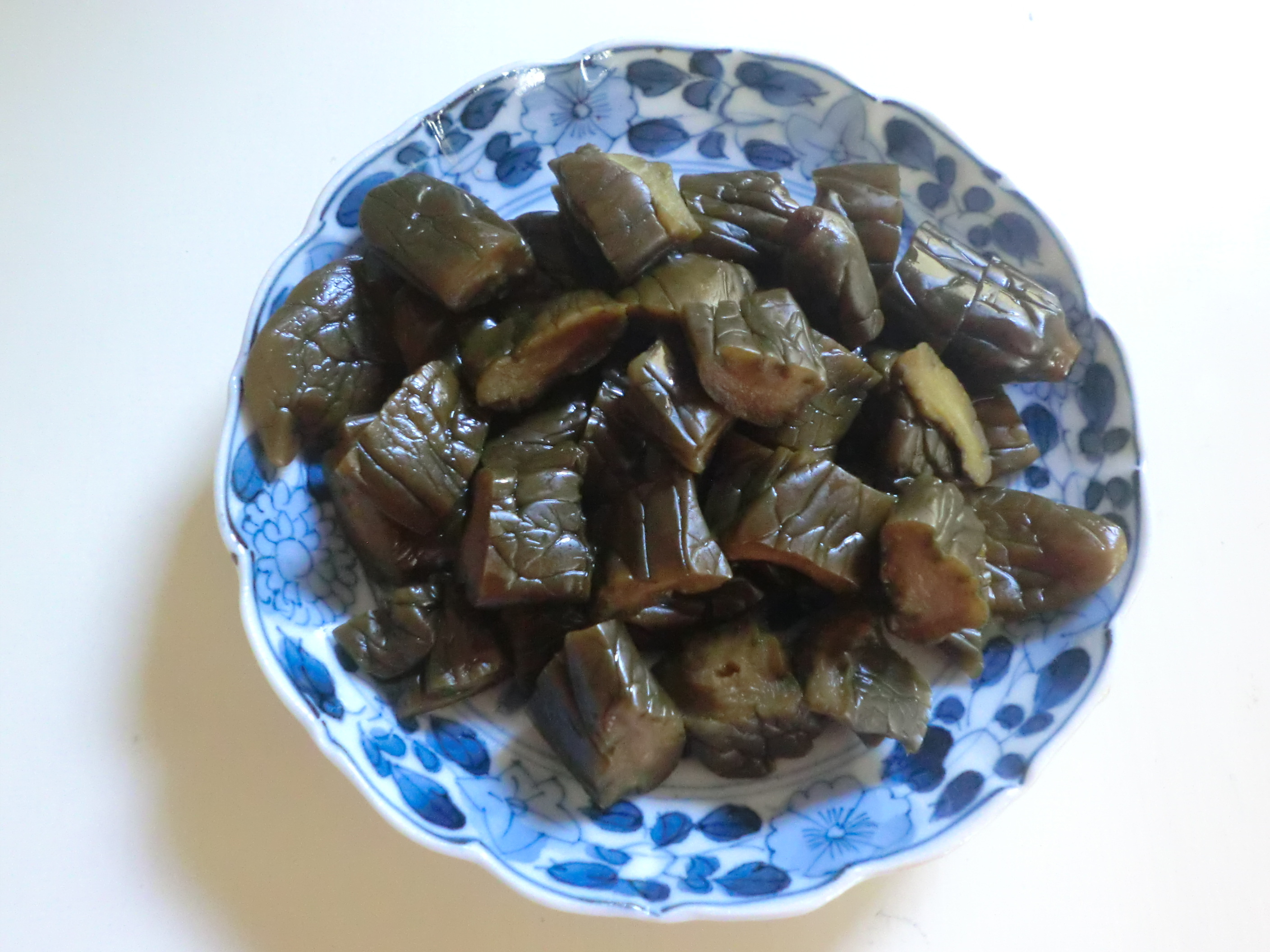 大分県で作られる吉四六漬け（きゅうり）です。